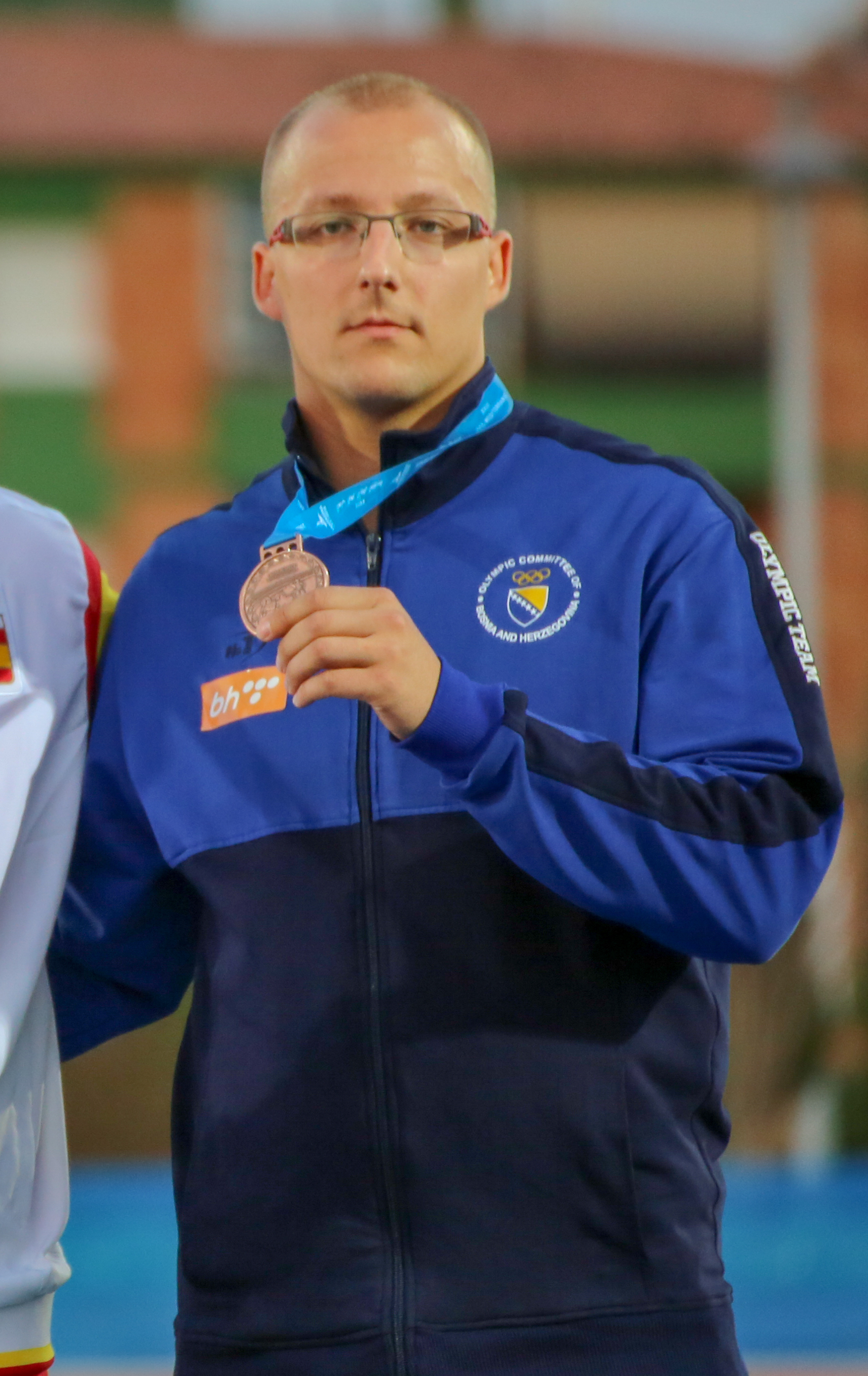 Dejan Mileusnić, medallista en lanzamiento de jabalina en los Juegos del Mediterráneo 2018